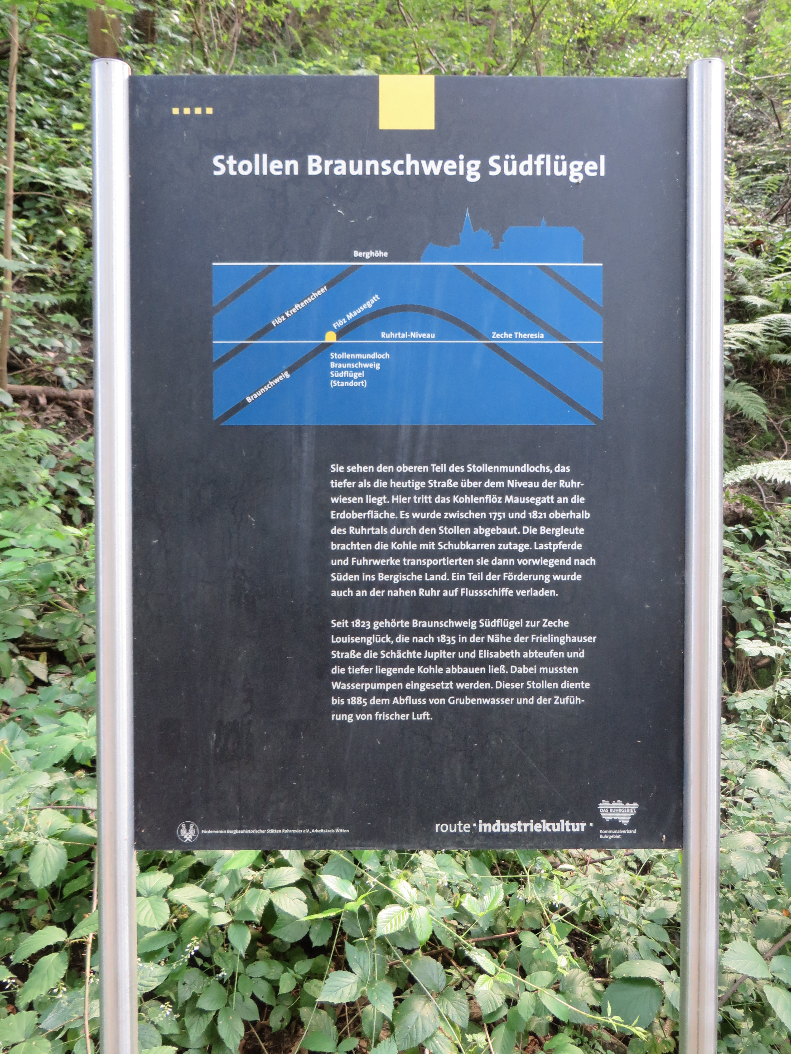 Infotafel zum Stollen Braunschweig Südflügel auf der Route der Industriekultur in Witten